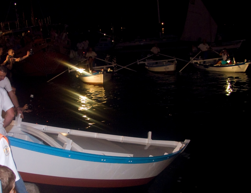 Batana, Rovinj